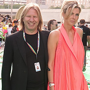 Виктор Дробыш с супругой на церемонии вручения премии МУЗ ТВ 2011 3 июня 2011 года